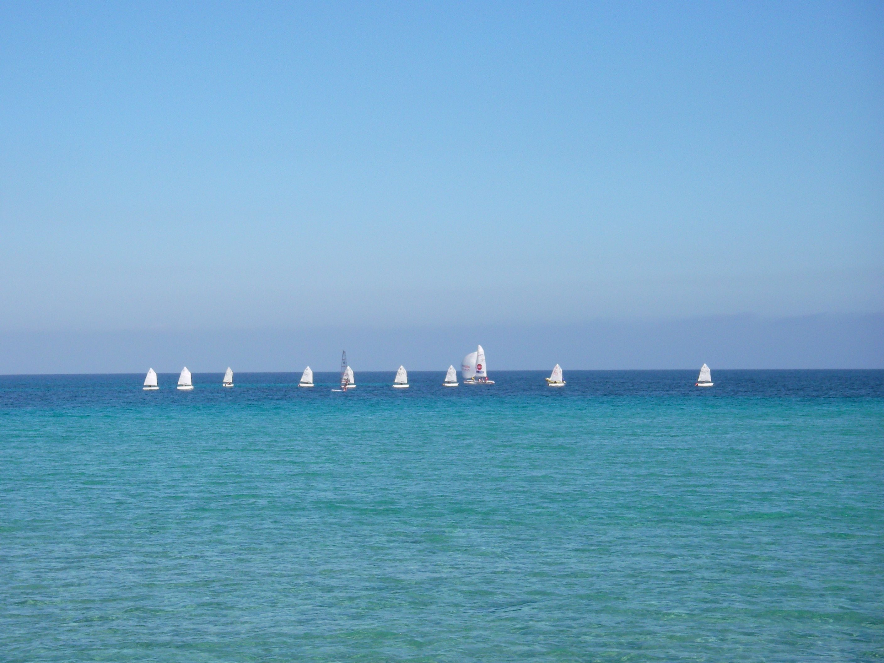 Foto mondello